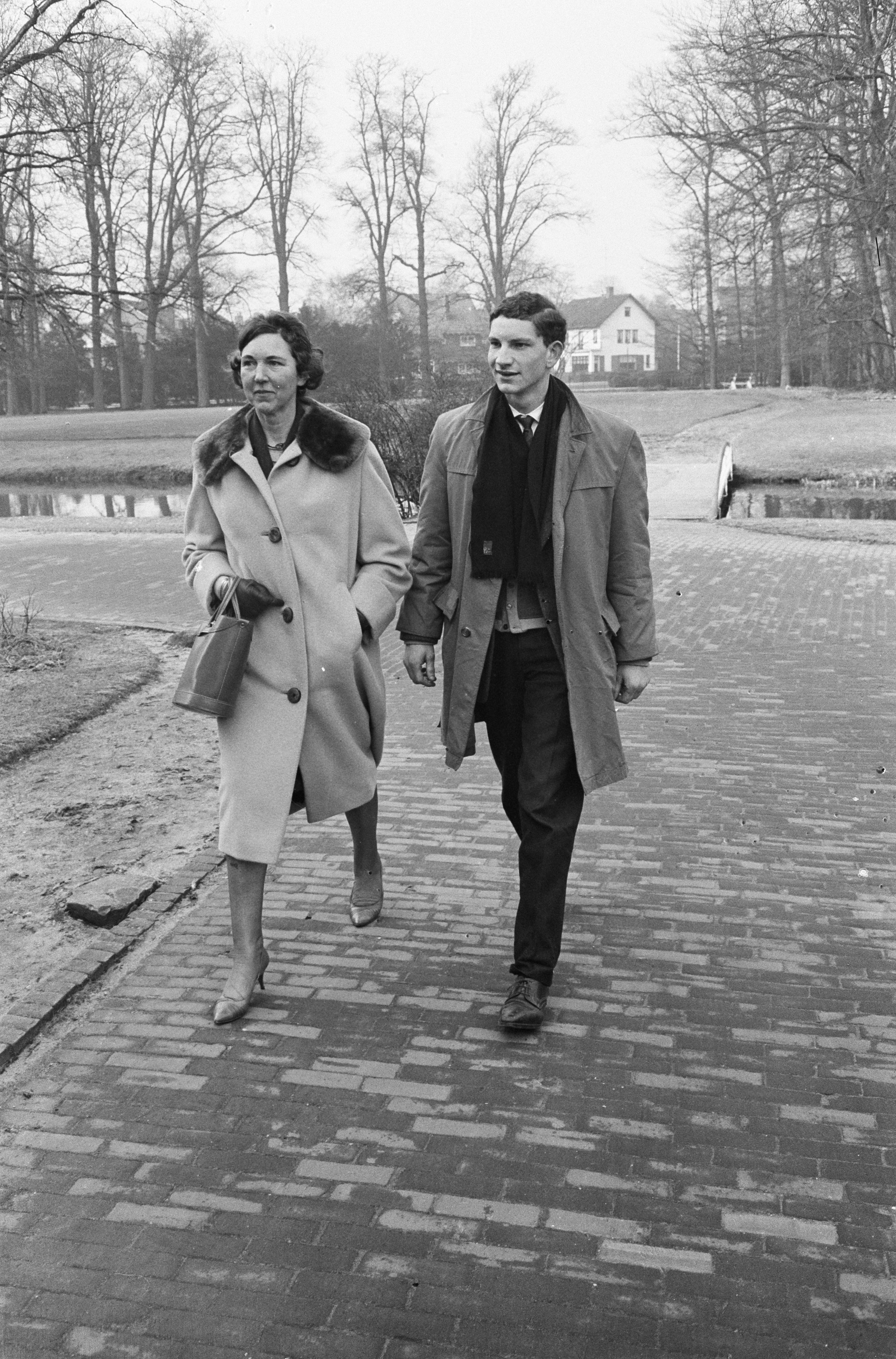 Collectie / Archief : Fotocollectie Anefo Reportage / Serie : [ onbekend ] Beschrijving : Zaak Van der Putten. Mevrouw Aernout en zoon Annotatie : Betreft "klokkenluider" Frans van der Putten, voormalig ambtenaar bij de Leger Technische Dienst te Bandoeng, die een aantal hoge officieren in Nederlands-Indië van o.a. corruptie en complotten beschuldigde. Hij werd eind 1961 door de toenmalige minister van Defensie Visser ontslagen. Mevrouw Aernout was de weduwe van vaandrig Aernout die in 1948 door Indonesische militairen was doodgeschoten. Aernout deed onderzoek naar de corruptie. Locatie: Landgoed Rennen Enk waar het Gerechtshof gevestigd was Datum : 23 maart 1962 Locatie : Arnhem Trefwoorden : rechtspraak Persoonsnaam : Aernout-Royaards, H.J. Fotograaf : Pot, Harry / Anefo Auteursrechthebbende : Nationaal Archief Materiaalsoort : Negatief (zwart/wit) Nummer archiefinventaris : bekijk toegang 2.24.01.05 Bestanddeelnummer : 913-6832